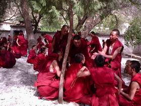 中文（中国大陆）: 色拉寺喇嘛辩经。